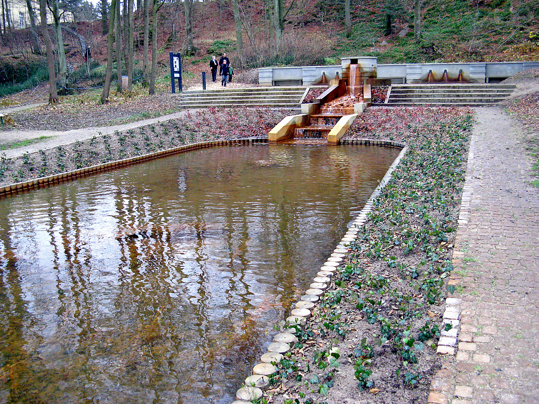 Arnakkekilden ved Silkeborg Bad og Ørnsø.